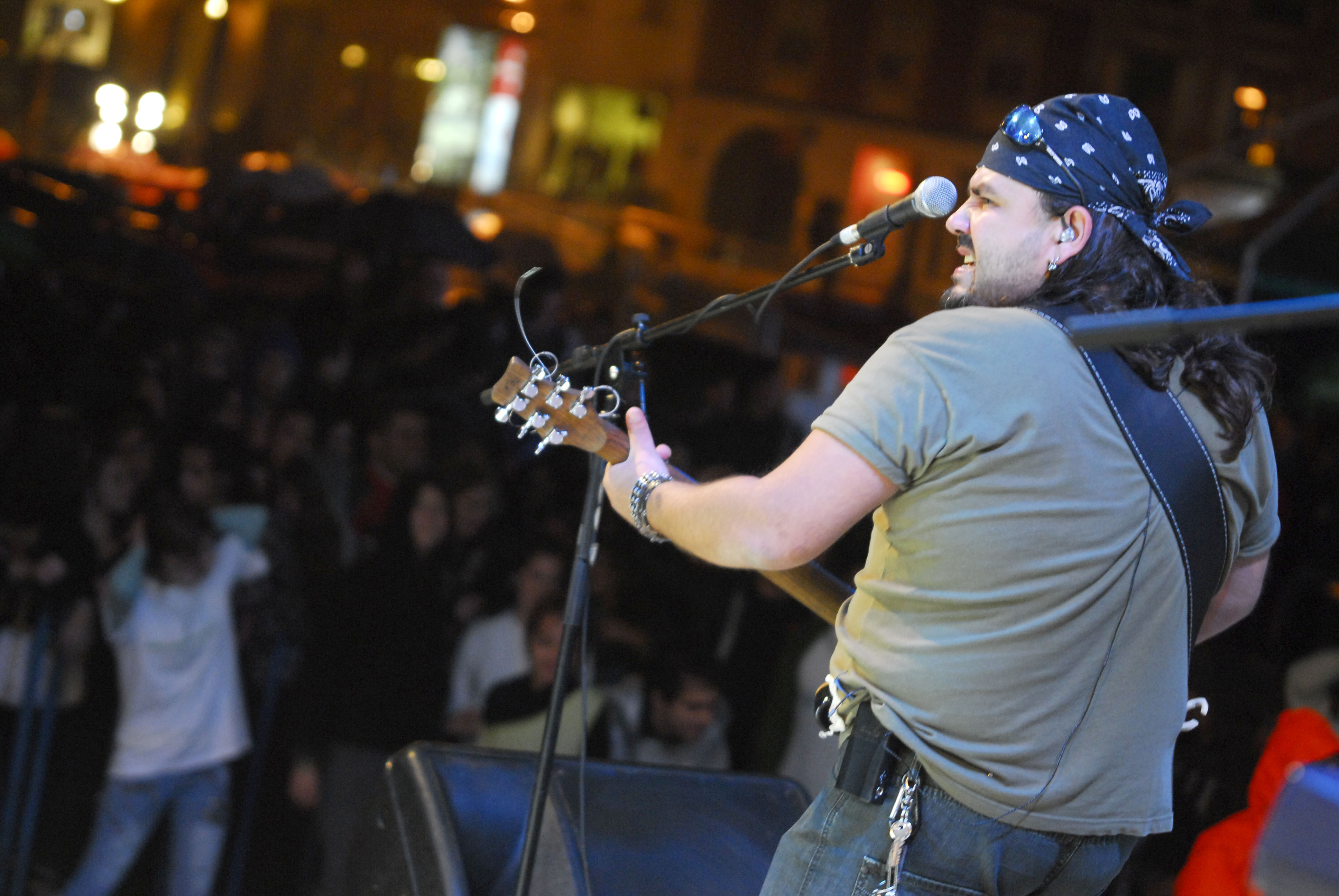 Adrian Igrisan in concert la Brasov, in a 3-a zi de campanie Umbrela Verde.